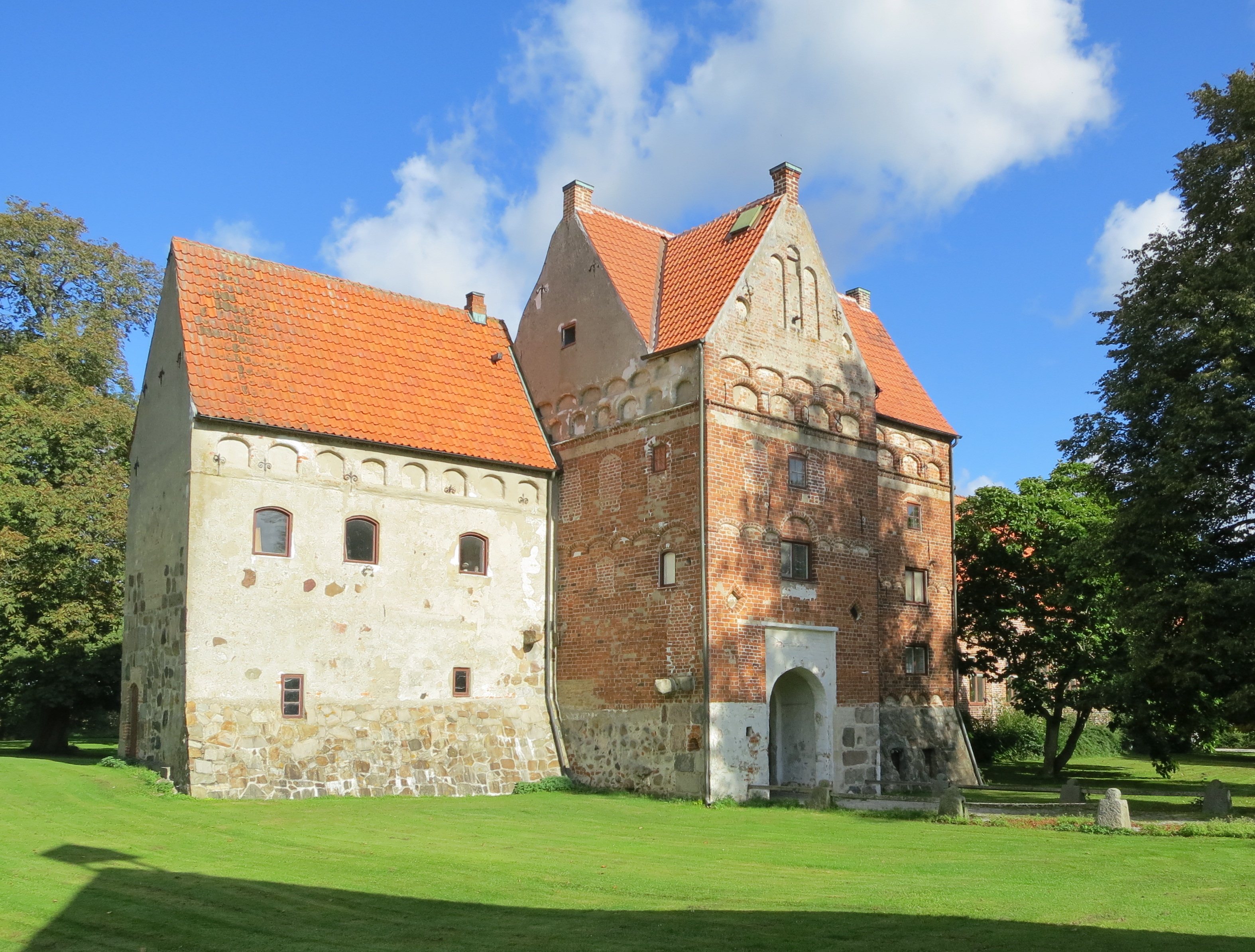 Borgeby slott (Borgeby 23:6)